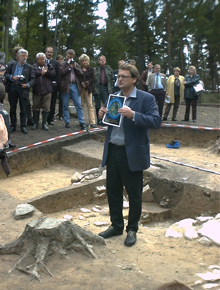 Mittelberg – Fundort der Himmelsscheibe von Nebra, Harald Meller mit den Medien an der Ausgrabungsstätte, rechts neben Mellers Schulter ist Prof. Pernicka (hellblaues Hemd) zu sehen.